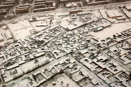 תמונה של טשקנט - צולמה ע"י ניר נוסבאום